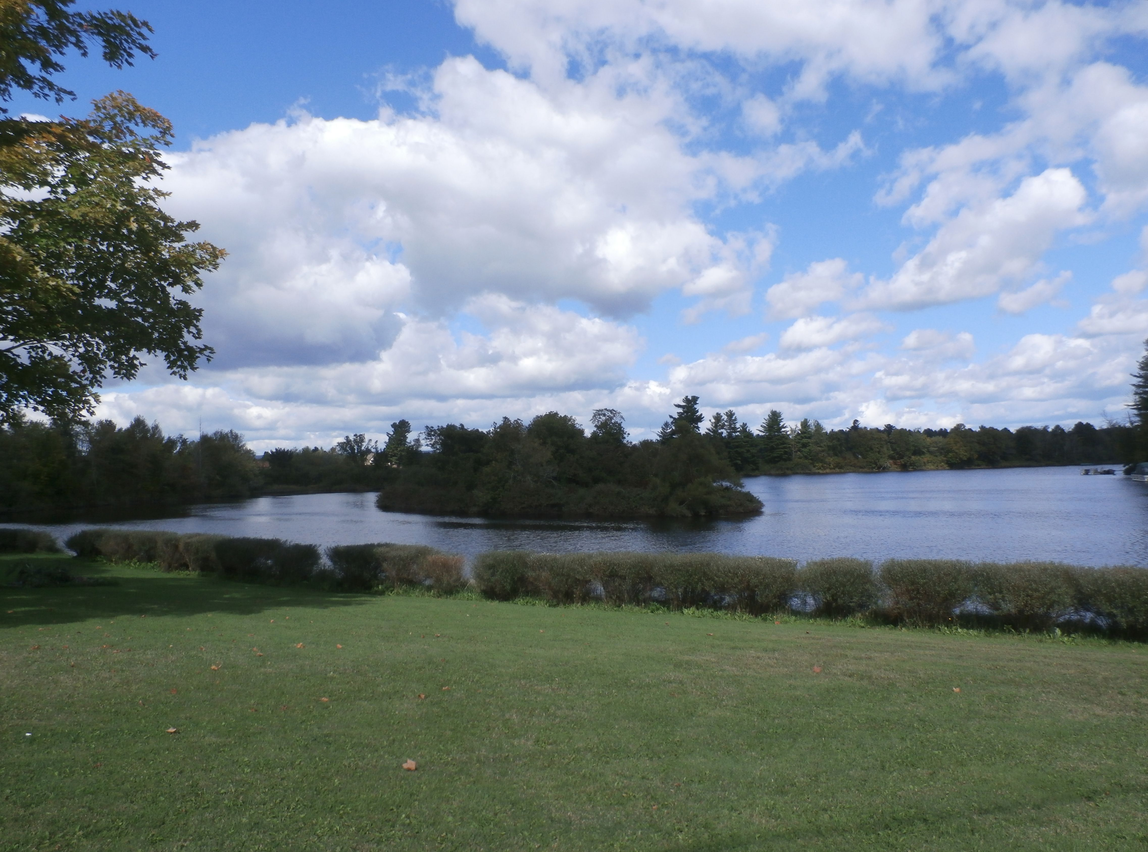 Rivière Saint-François près du hameau de Bishopton.